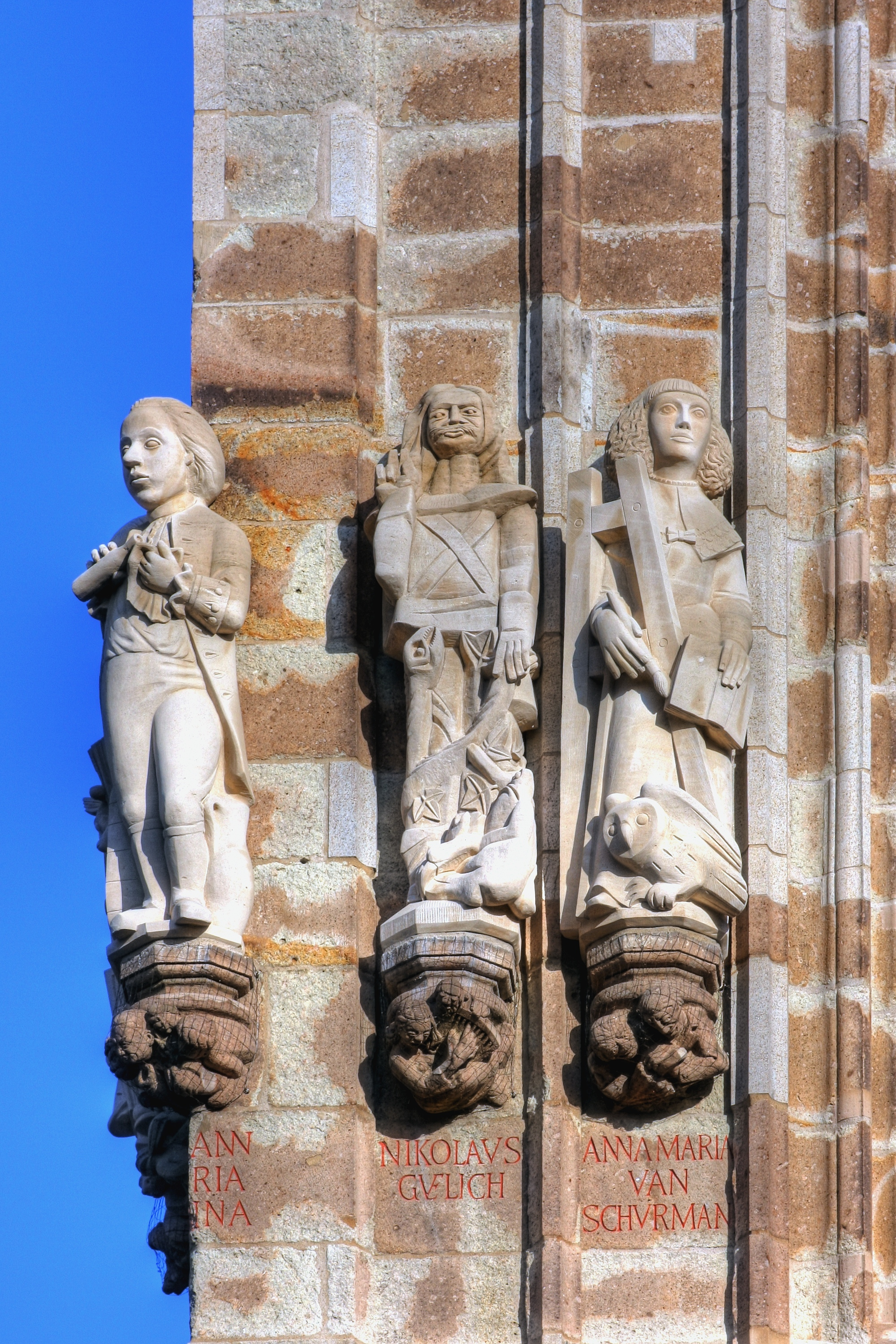 Rathausturm Köln mit den Figuren von: Johann Maria Farina - Nikolaus Gülich - Anna Maria van Schurman